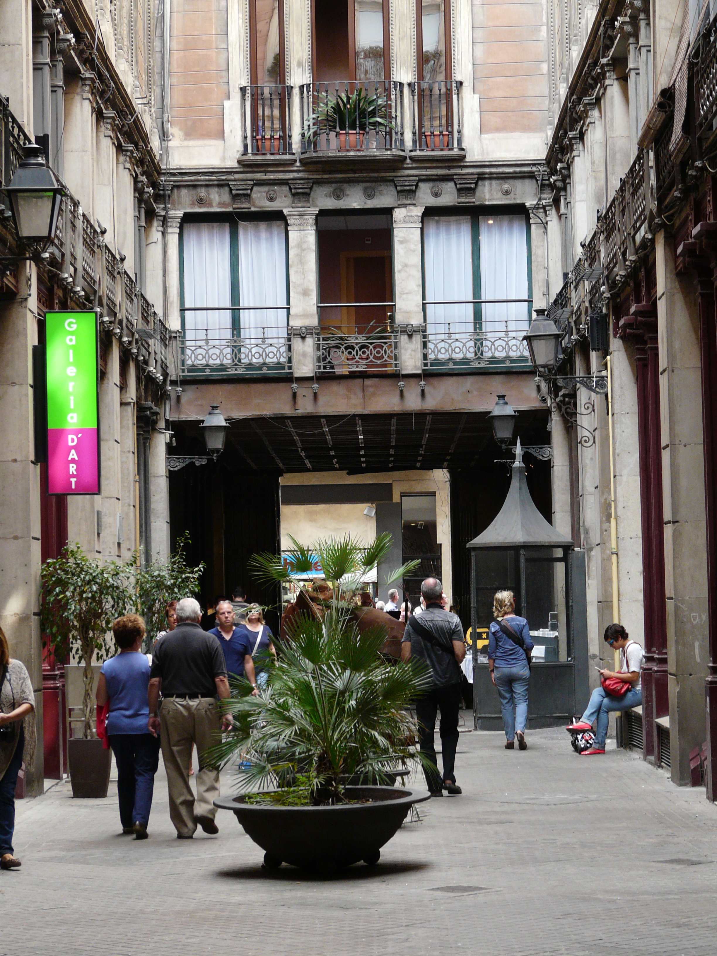 Edificis d'habitatges del passatge del Crèdit. Passatge del Crèdit, 1-10 (Barcelona). Object location41° 22′ 55.04″ N, 2° 10′ 34.8″ E